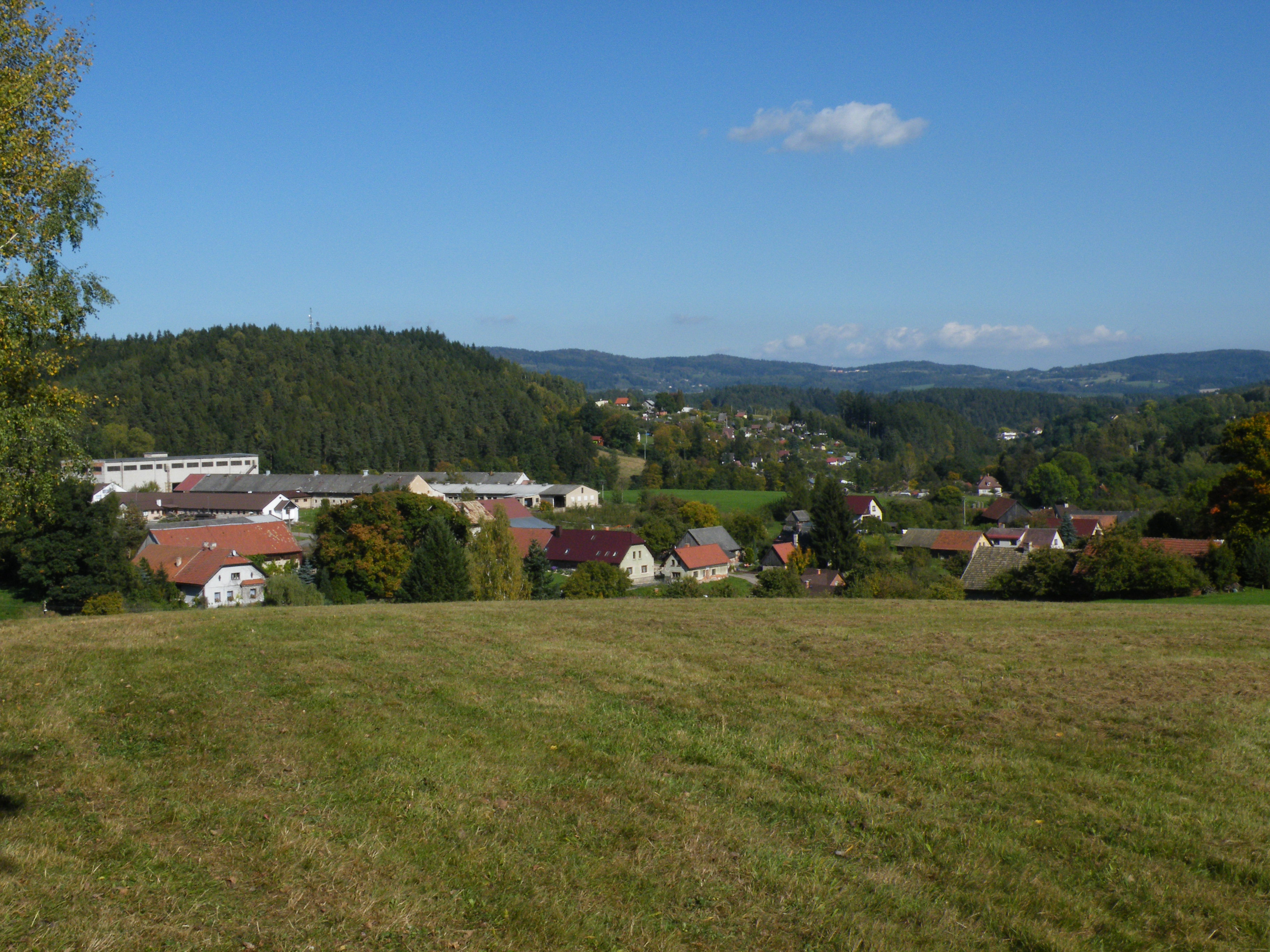 Radeč foto z Vaňurova kopce r.2011 Vesnice okresu Trutnov